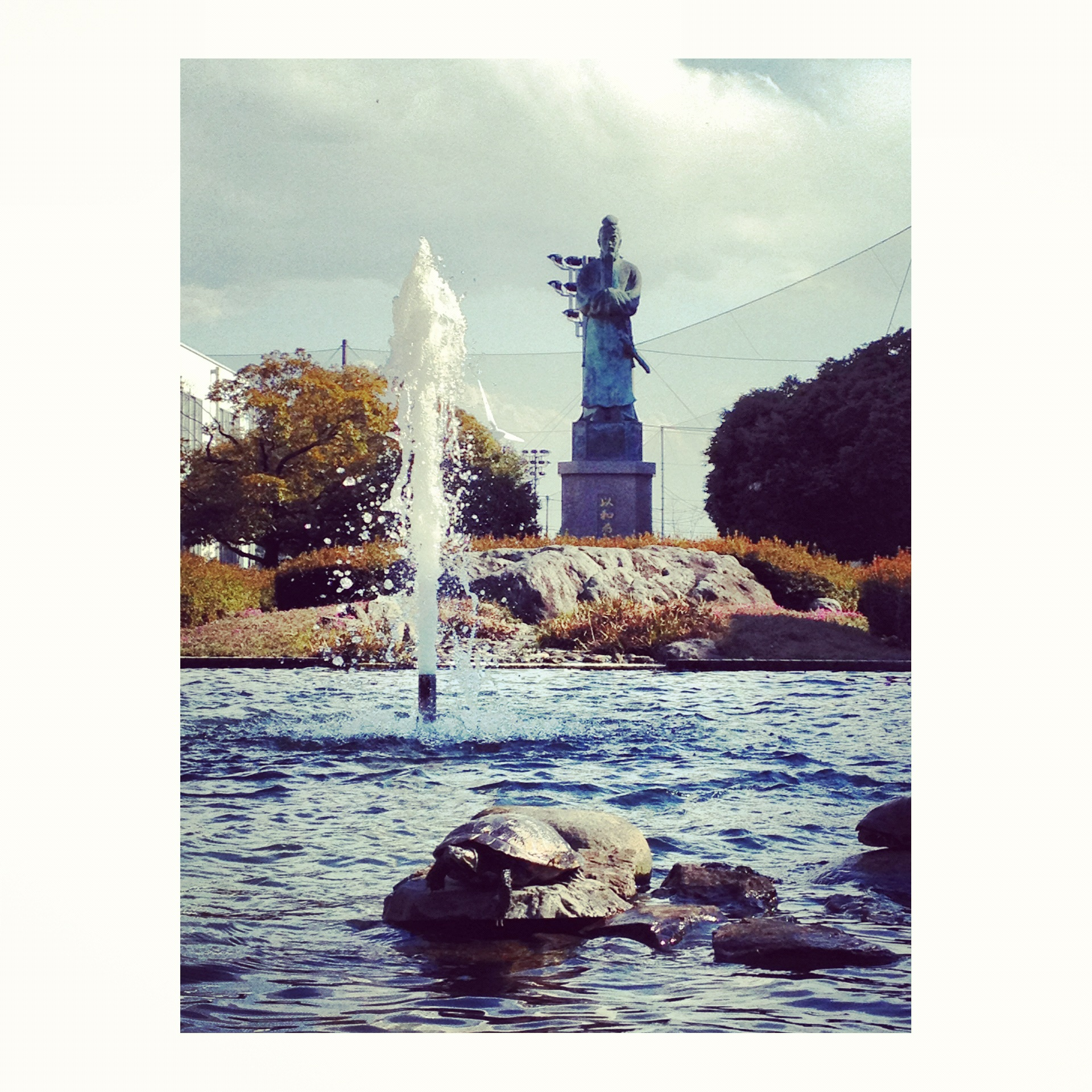 足利工業大学キャンパス内